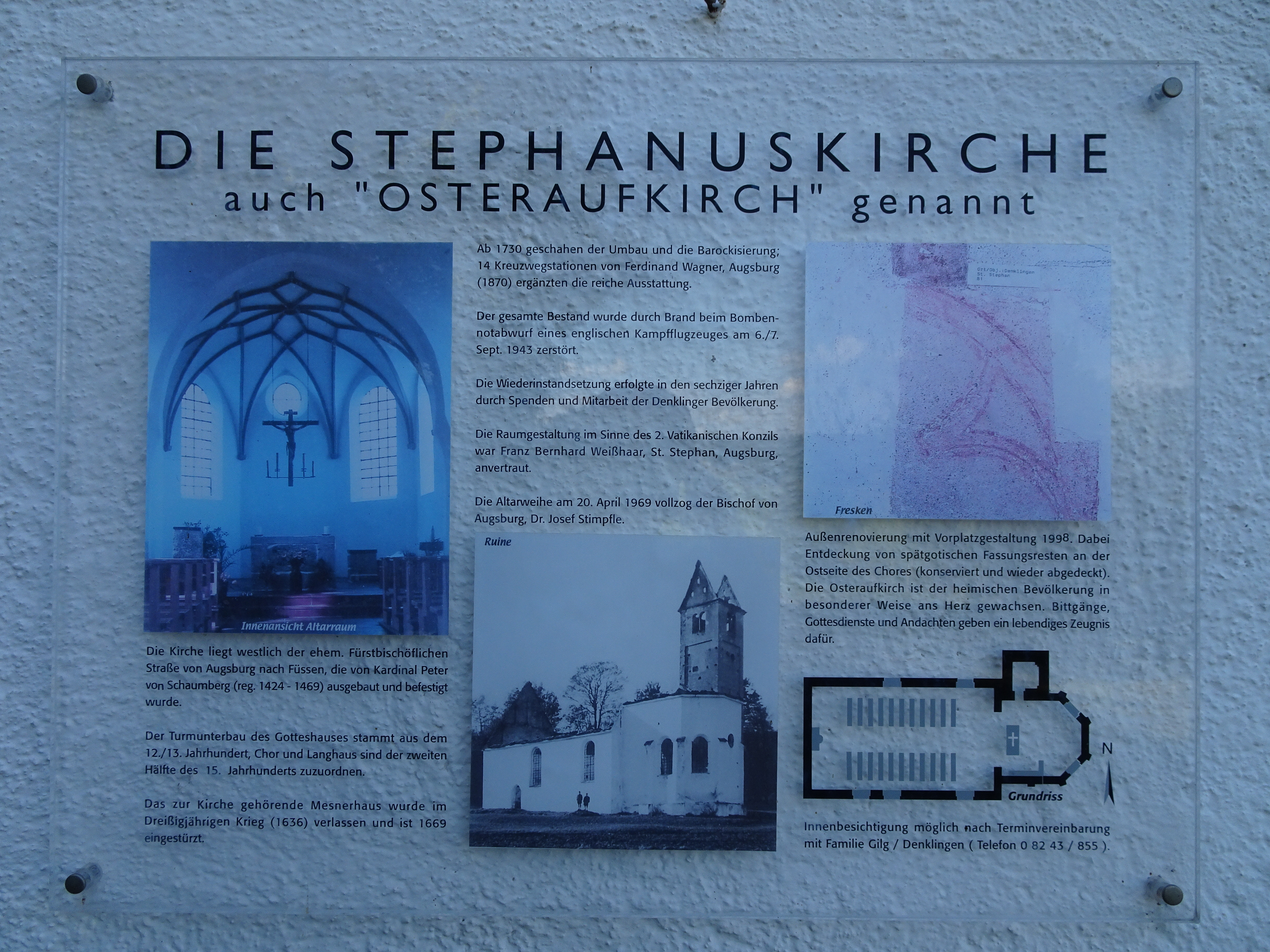 Infotafel über die Geschichte der Osteraufkirche St. Stephan inkl. der Zerstörung 1943